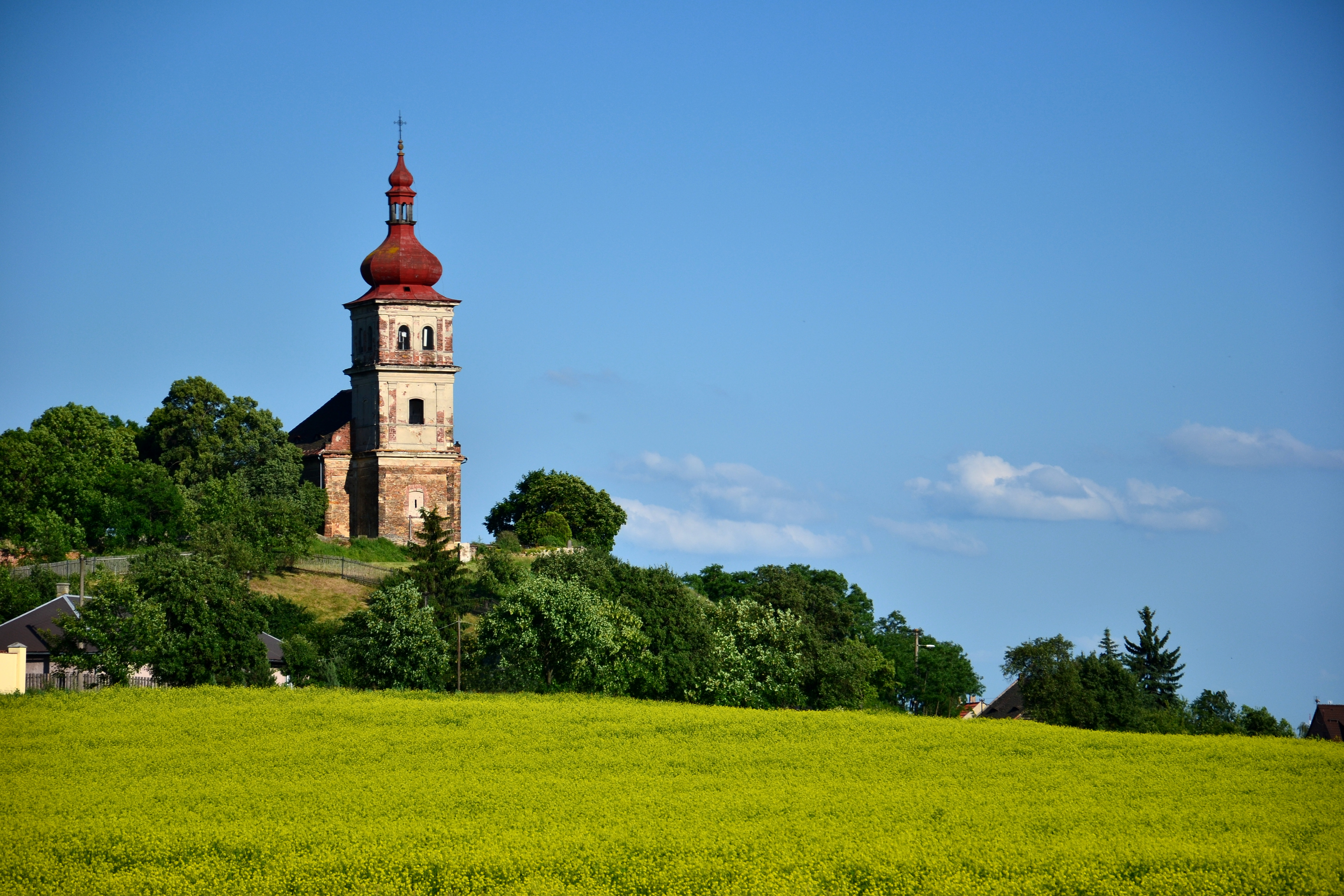 Kostel svatého Matouše od Údlic, Přečaply.